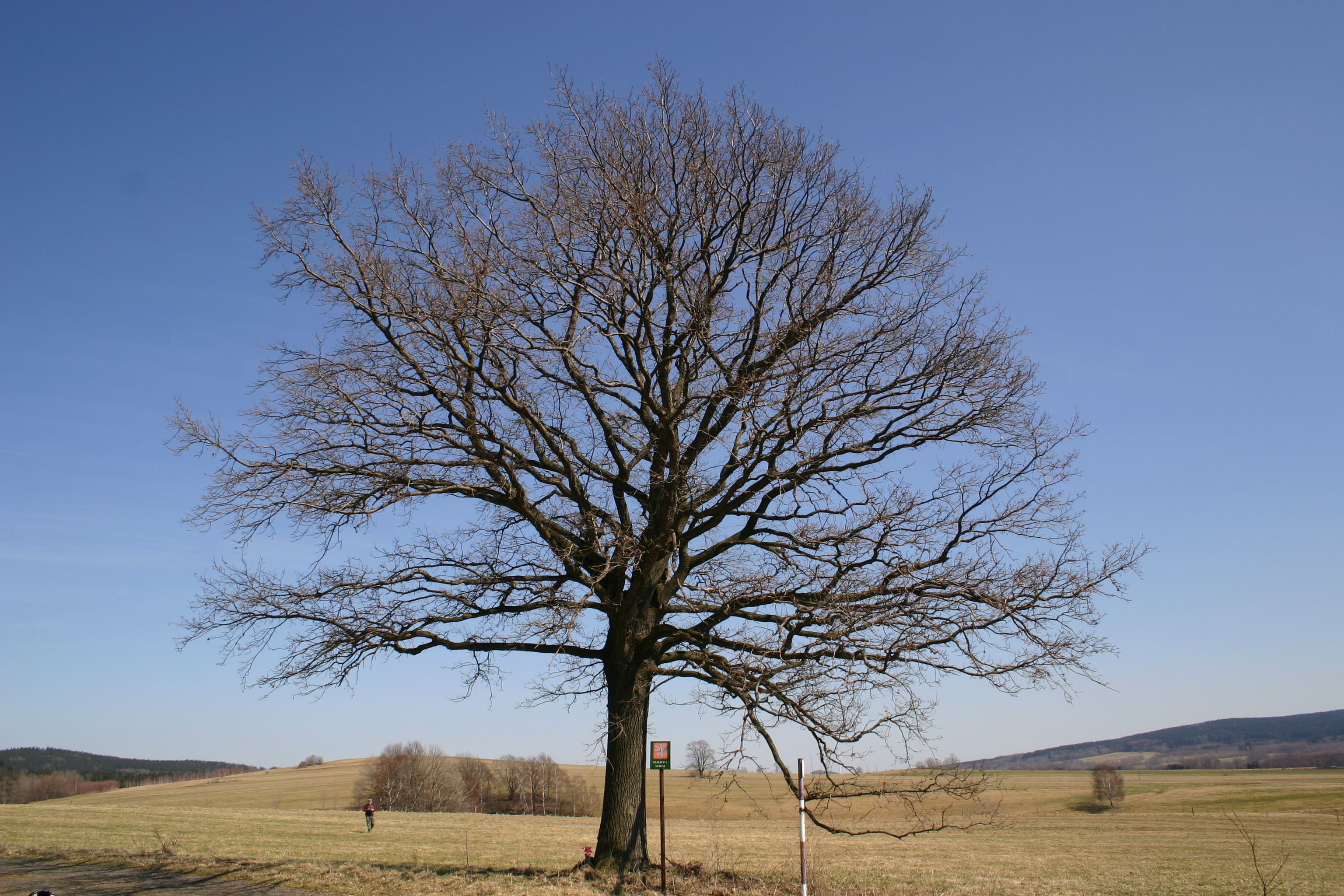 Dub u Kocourovy cesty - Dolní Řasnice